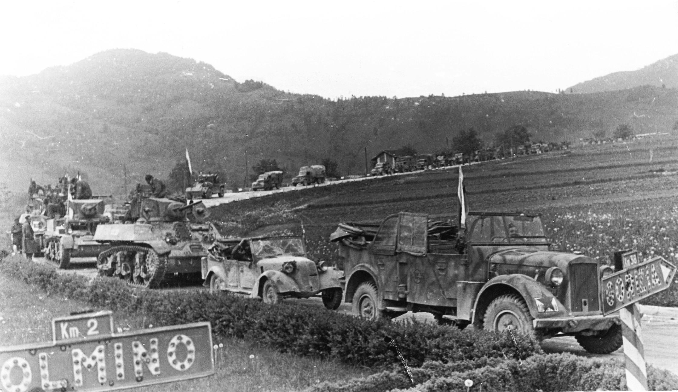 Motorizovane jedinice 4. armije nastupaju prema Tolminu, maja 1945.